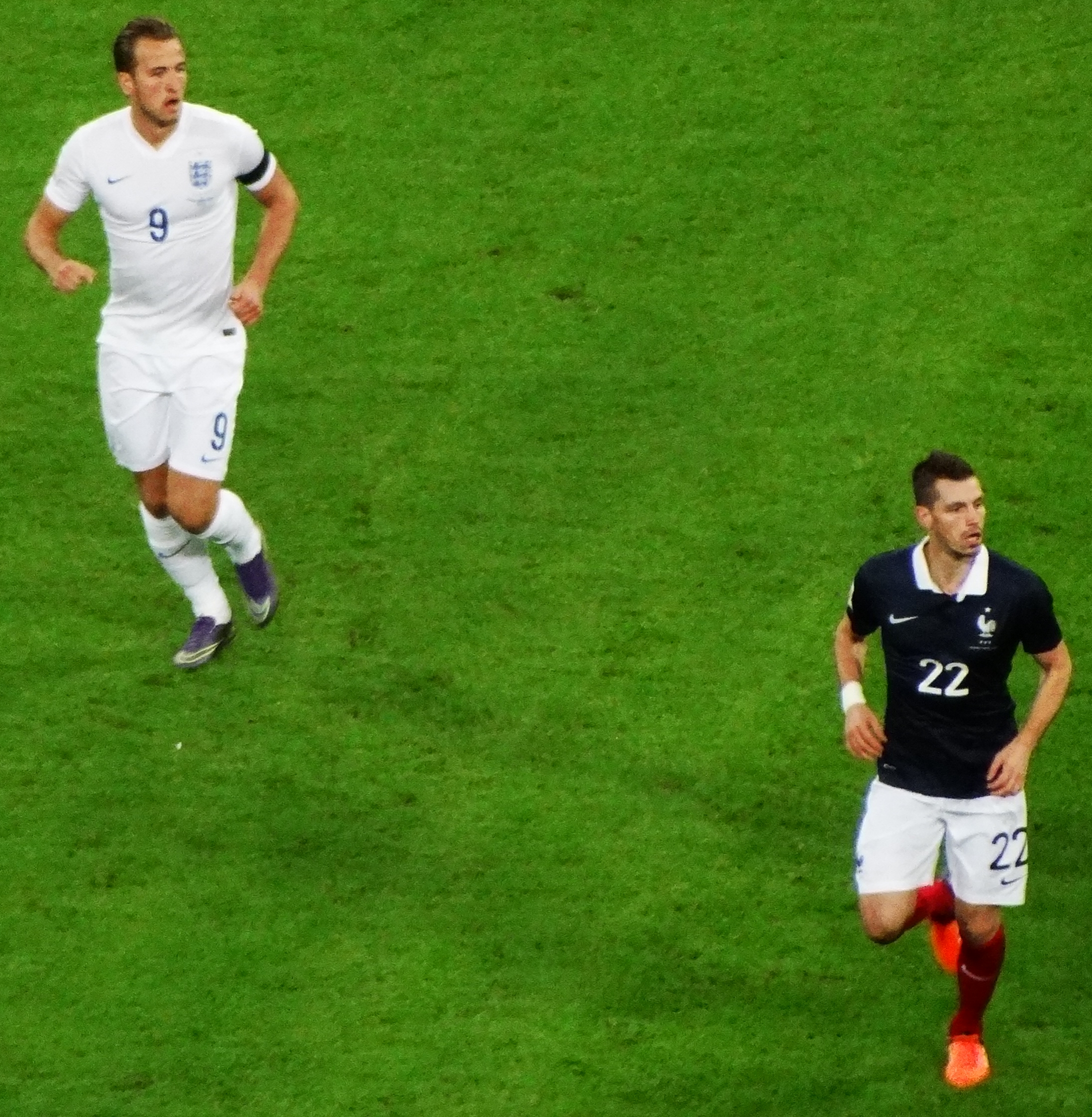 England striker Harry Kane and France midfielder Morgan Schneiderlin